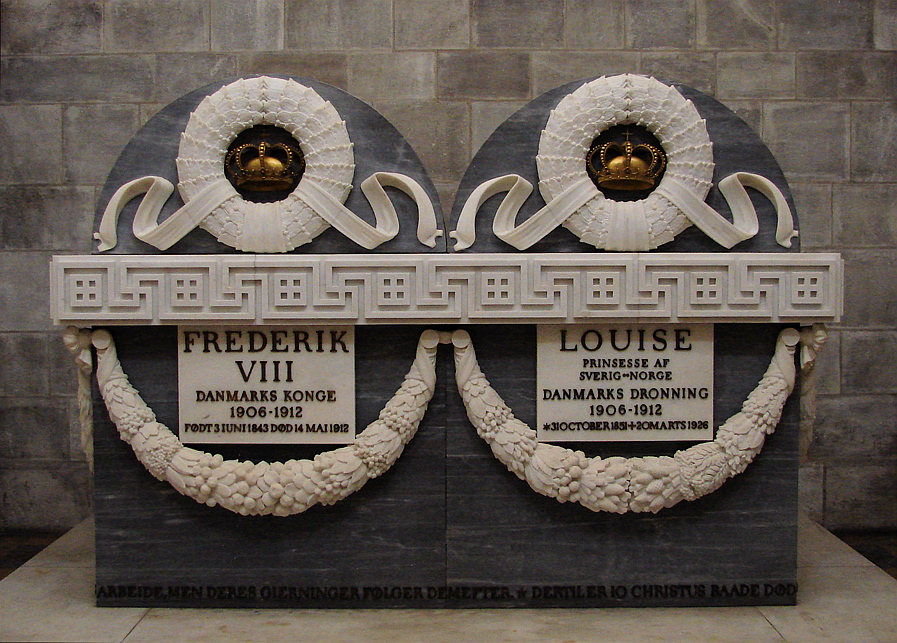 Frederik VIII, Danmarks konge og Louise, prinsesse av Sverig-Norge, gravmæle, Roskilde Domkirke, Sjælland